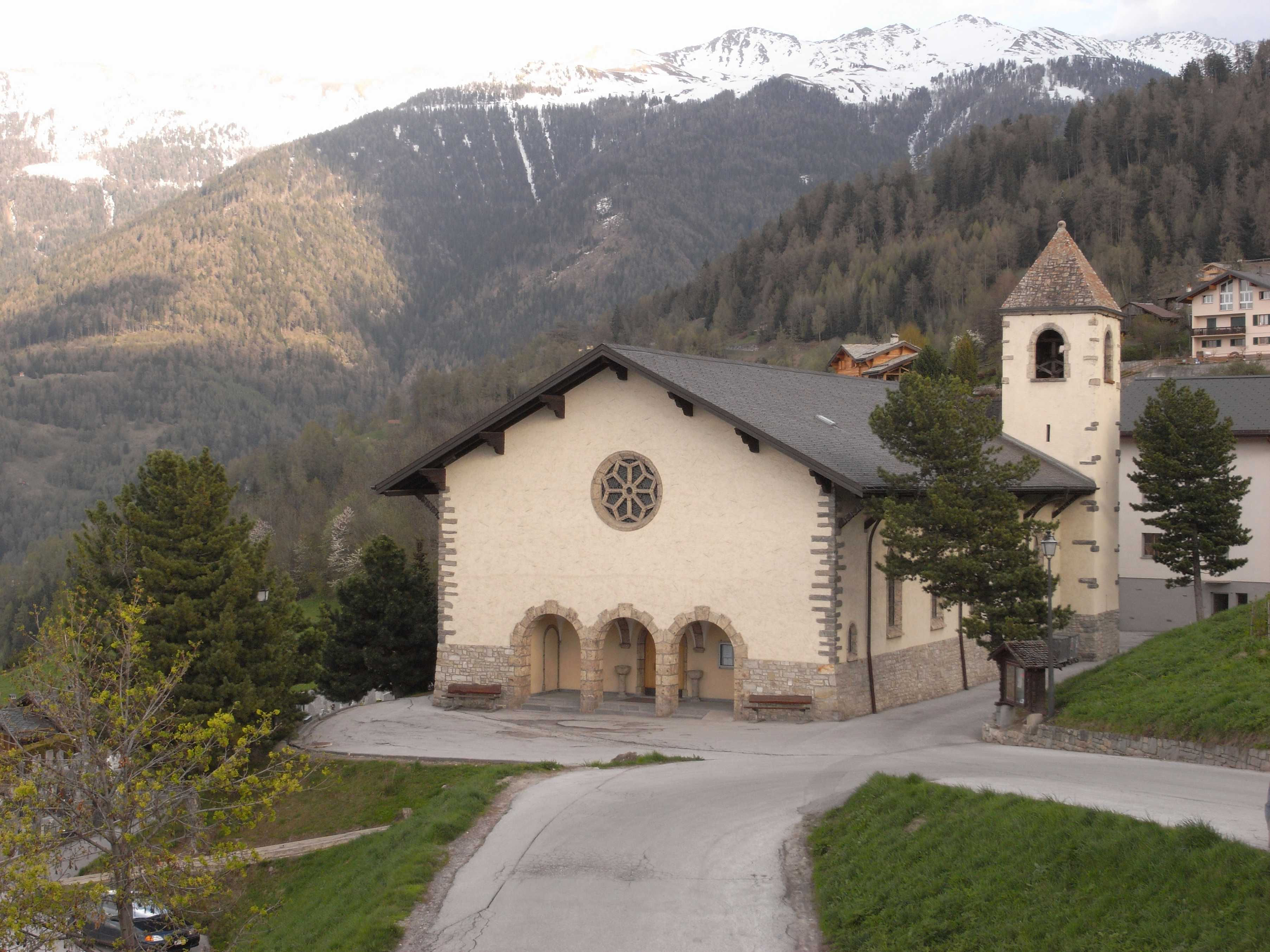 Haute-Nendaz (Kanton Wallis, Schweiz), neue Kirche